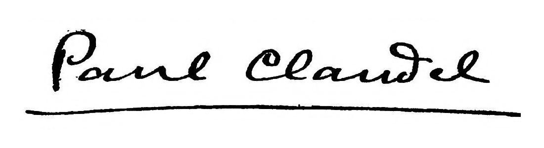 Signature de Paul Claudel sur la lettre du 28 mars 1914, acceptation de faire une édition traduite en anglais de Connaissance de l'Est, adressée à Yale University Press. Reproduite en fac-simile dans l'ouvrage "The East I know", Yale University Press, New Haven, 1914.